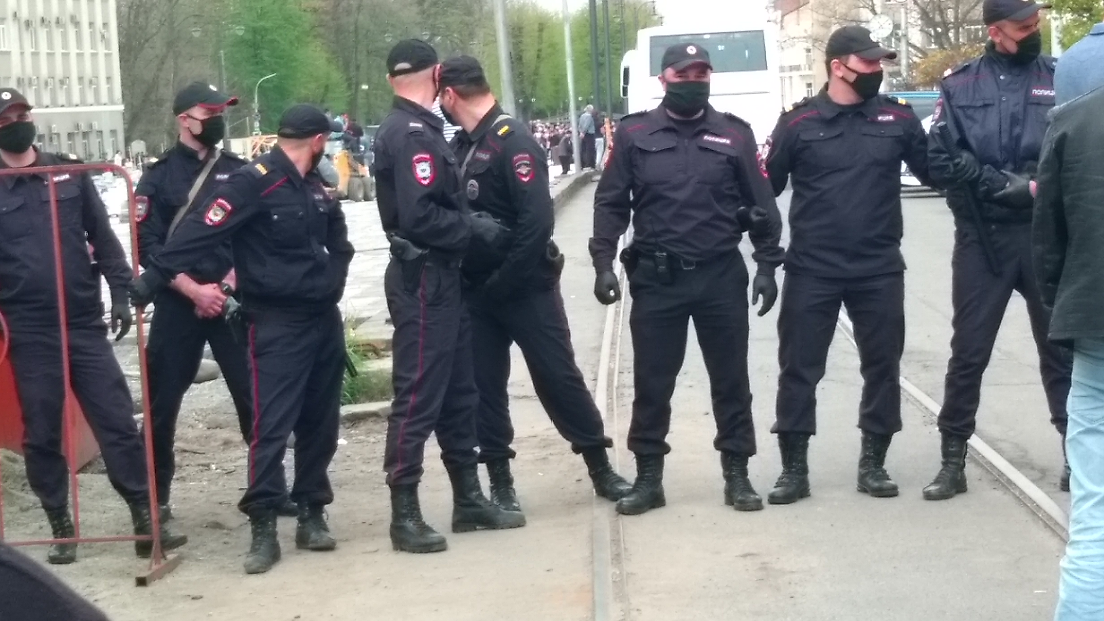 Протест против режима самоизоляции во Владикавказе